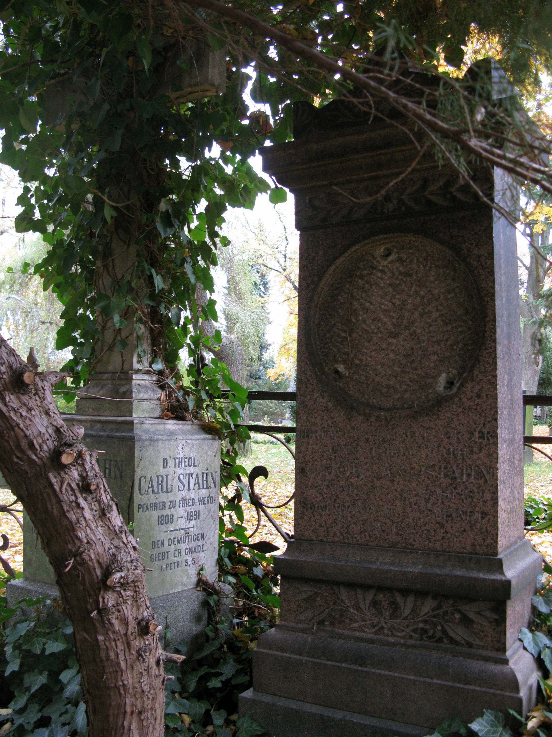 Grabmal Carl Stahn auf dem Friedrichswerderschen Friedhof II in Berlin